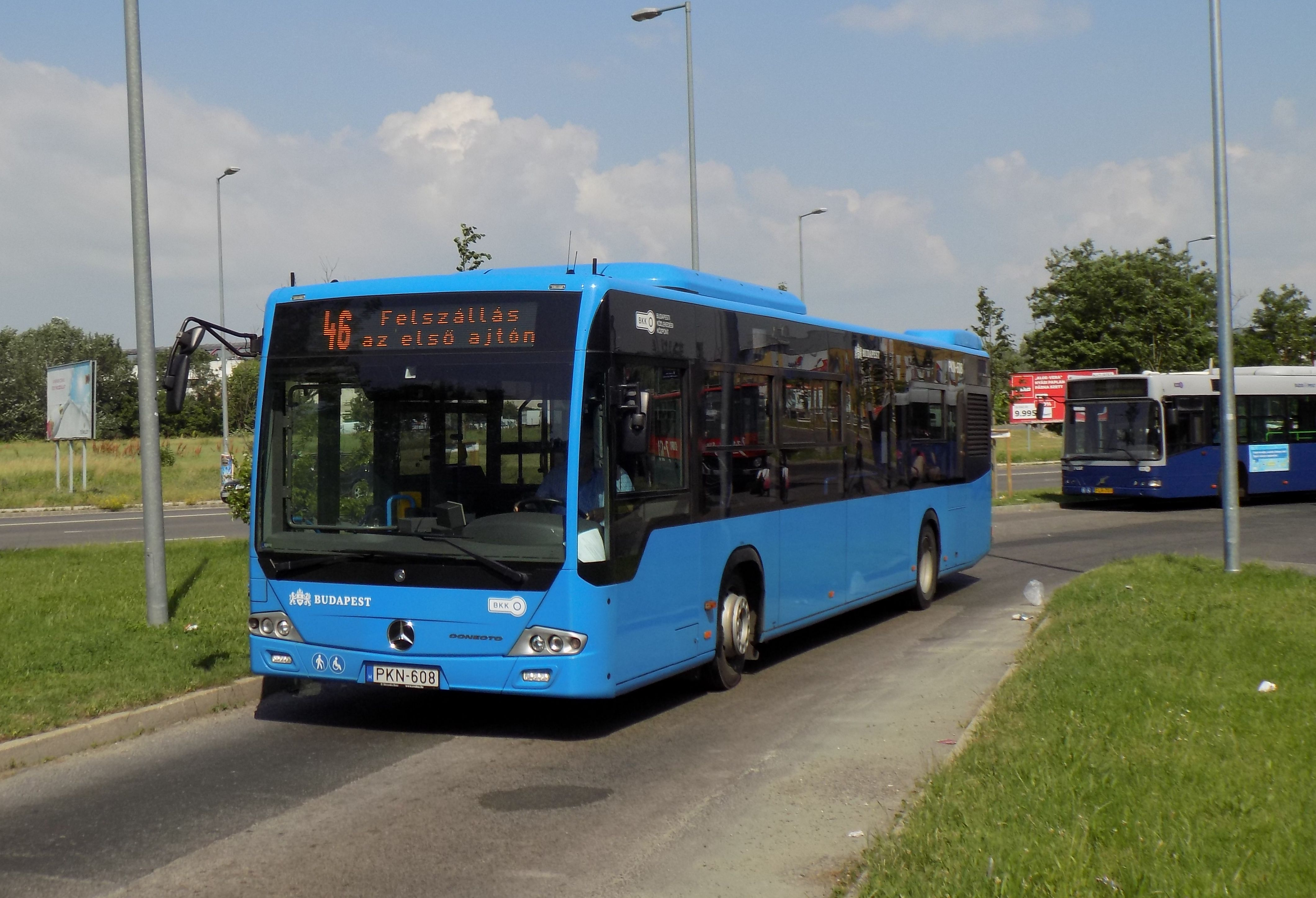 46-os jelzésű Mercedes-Benz Conecto az újpalotai buszvégállomáson (frsz. PKN-608)